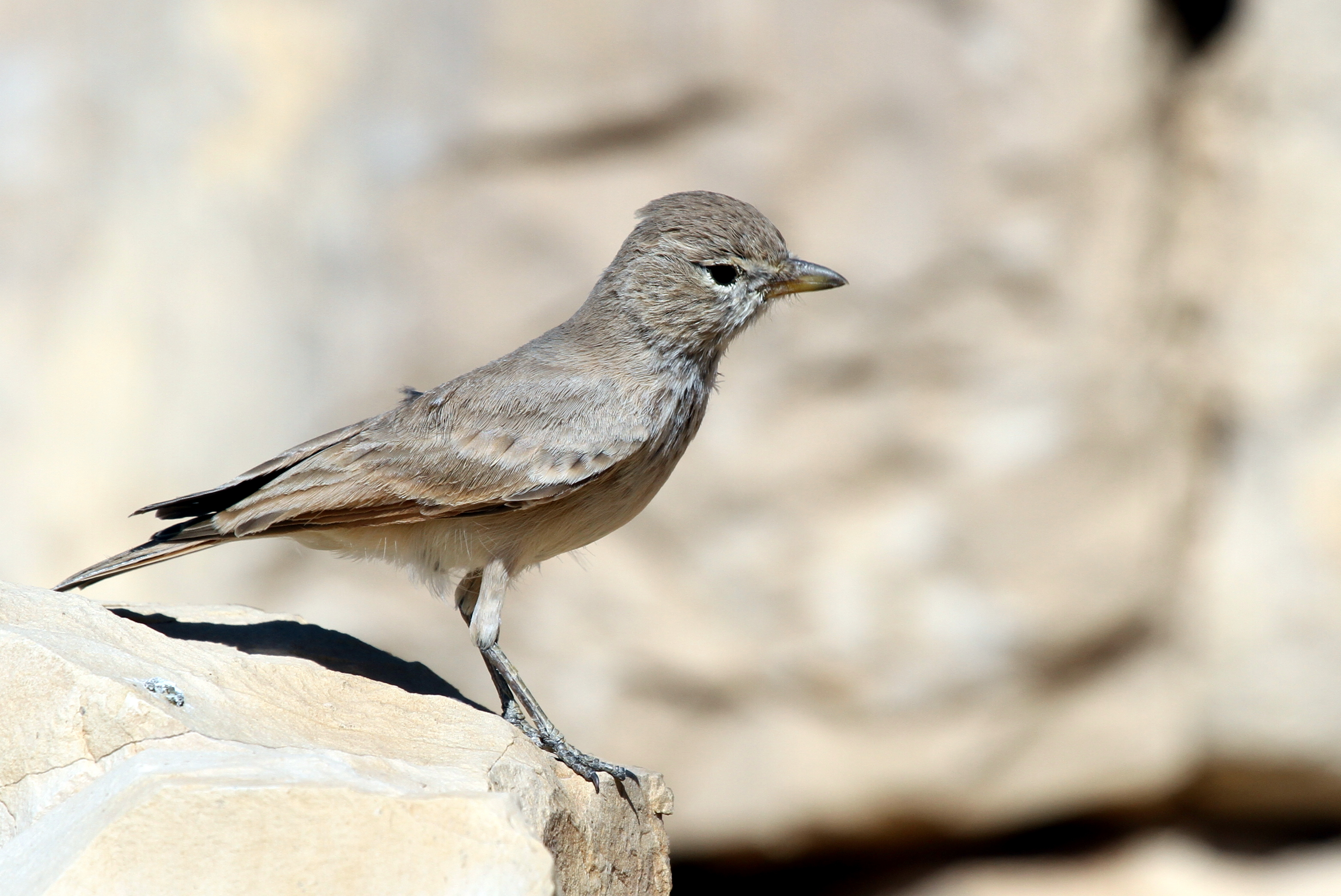 Desert Lark Israel